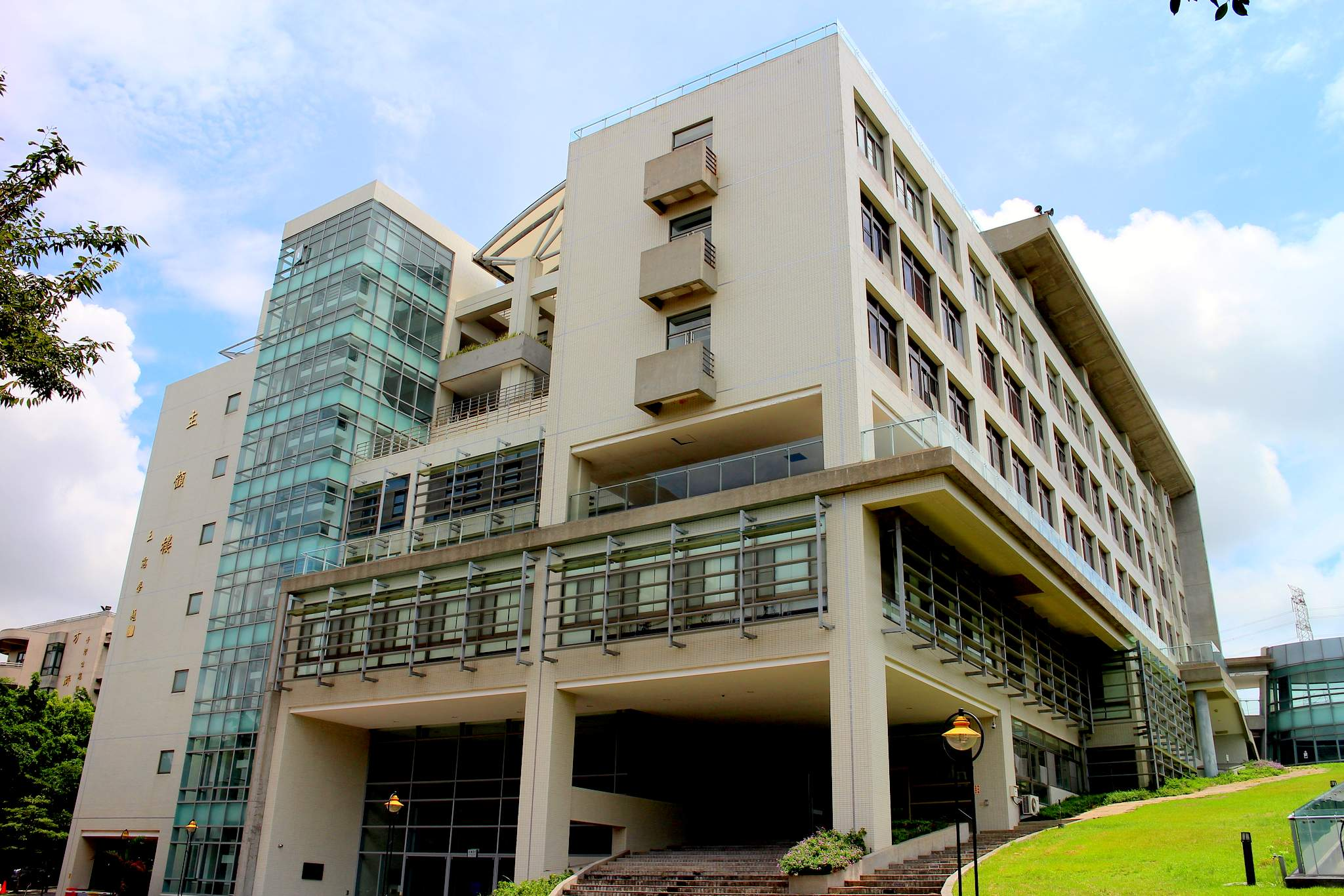 台中市靜宜大學主顧樓